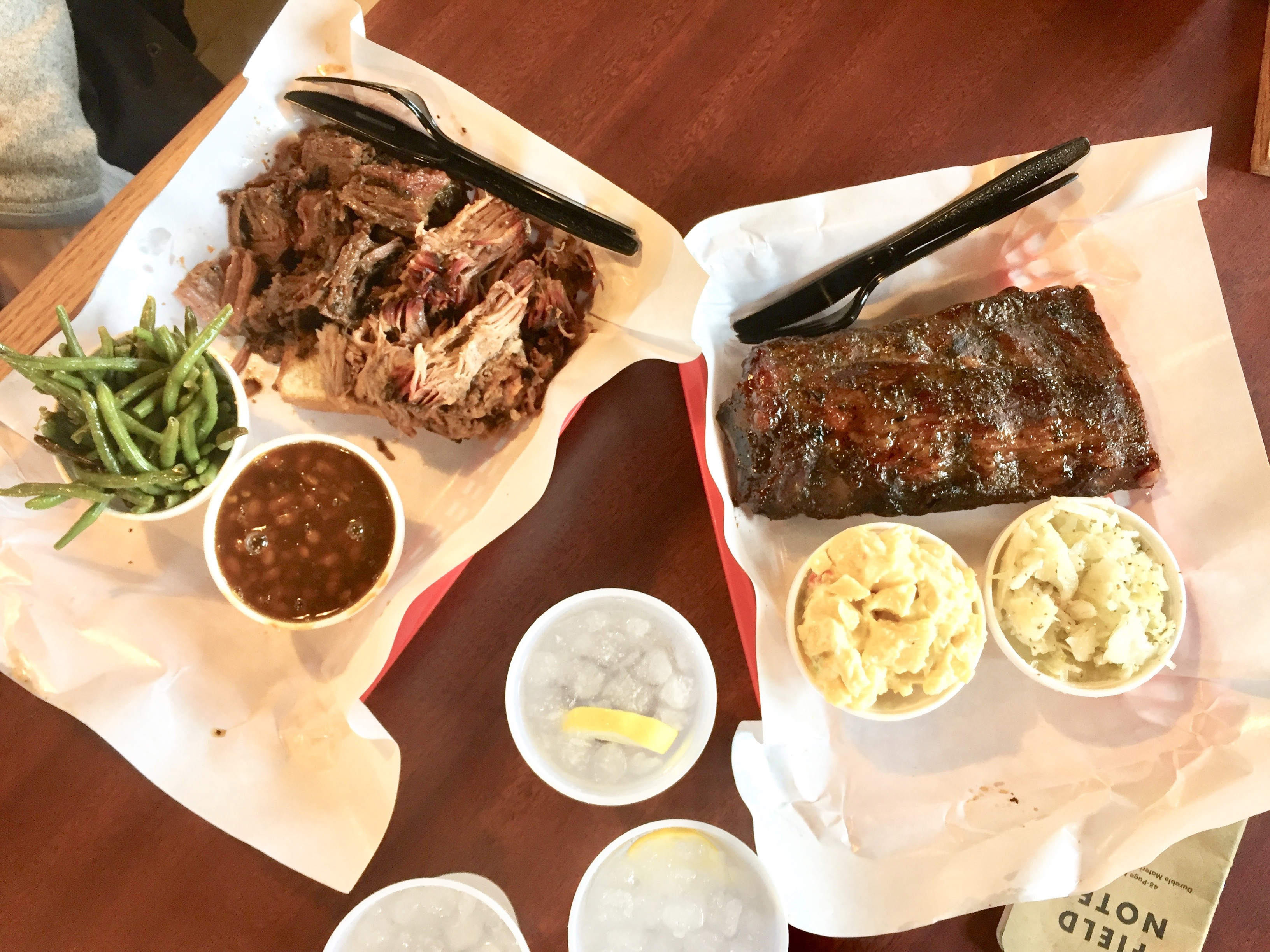 Pappy's Smokehouse